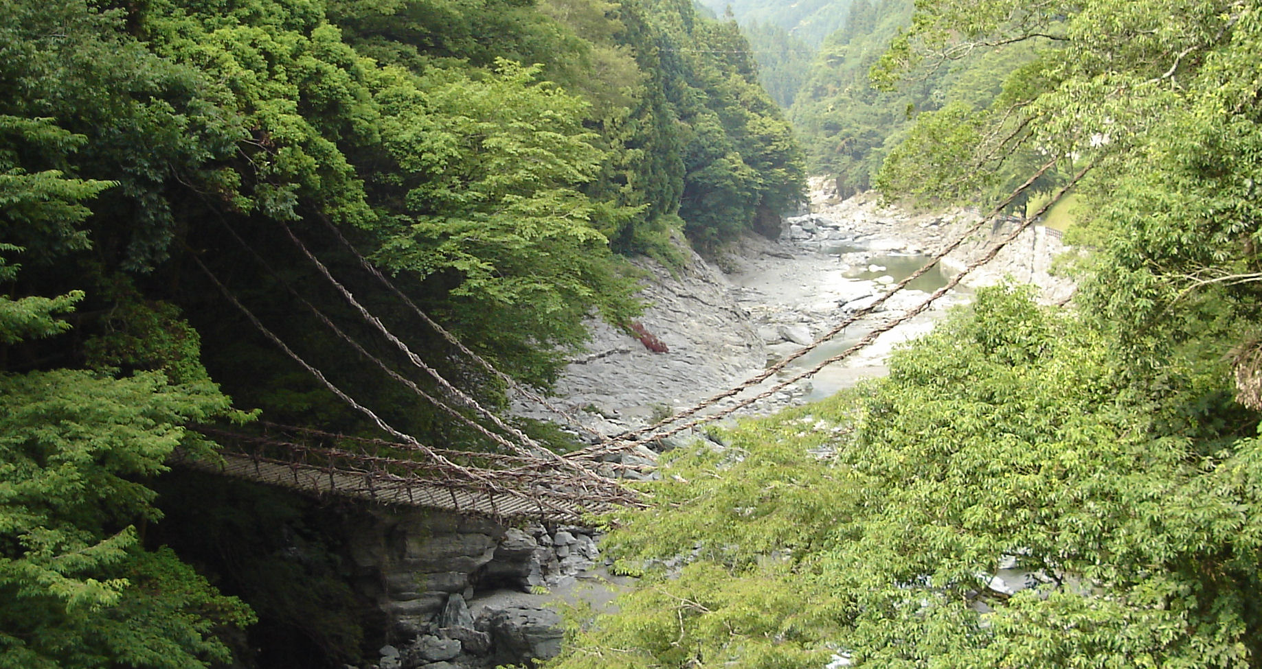 投稿者撮影2005/06/24 祖谷のかずら橋 Category:徳島県の画像